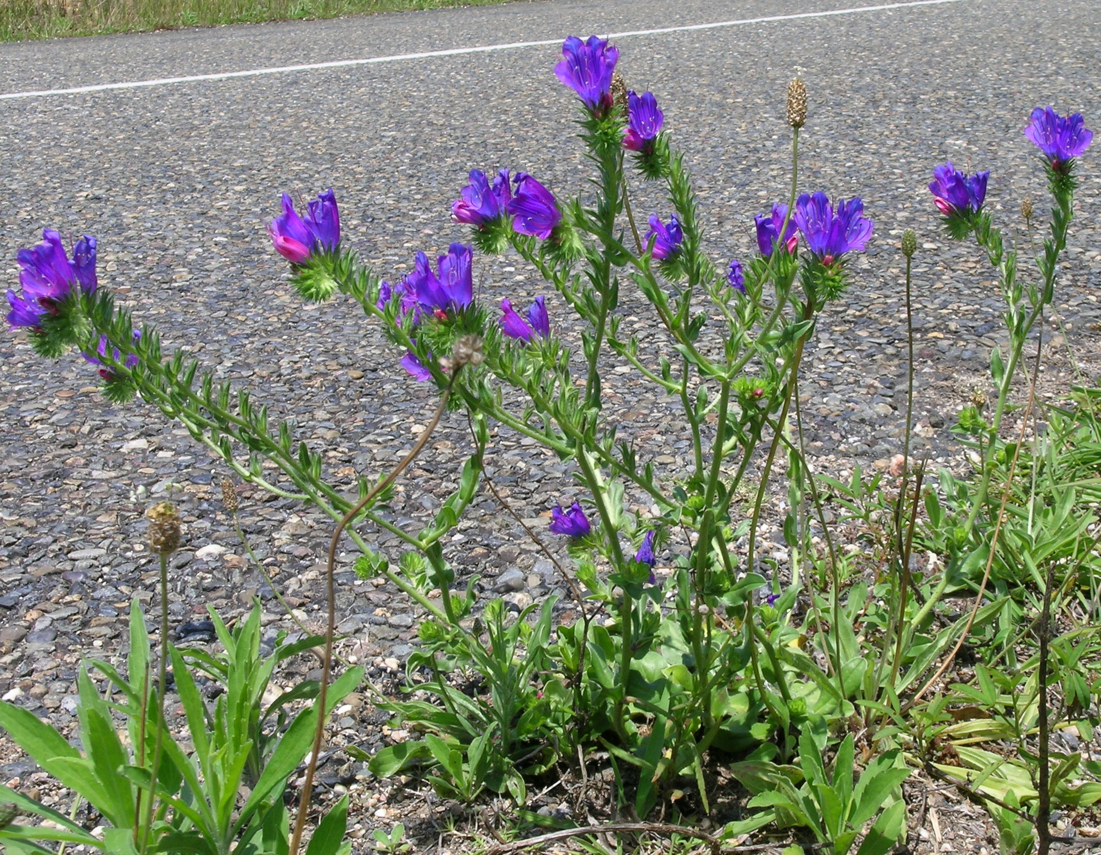 Echium plantagineum plant1